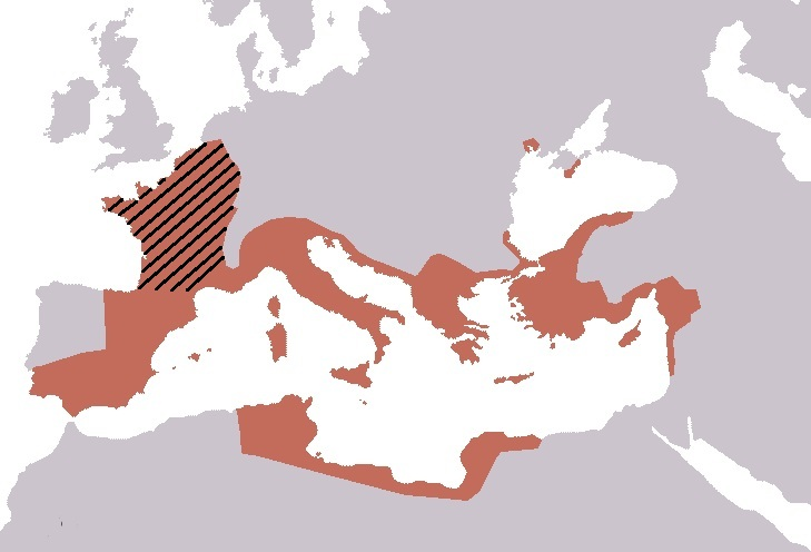 Map of the Roman Republic in 40 BC after the recent conquests of Julius Caesar. I added a border in france areas